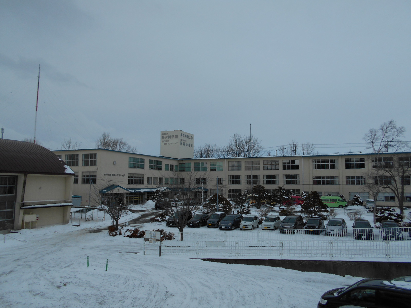 釧路短期大学